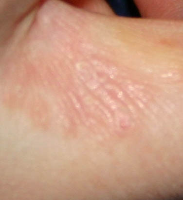 Beschreibung: Acarodermatitis Ursprung: Selbst fotografiert von Sven Teschke am 4. Januar 2005 Lizenzstatus: GNU FDL